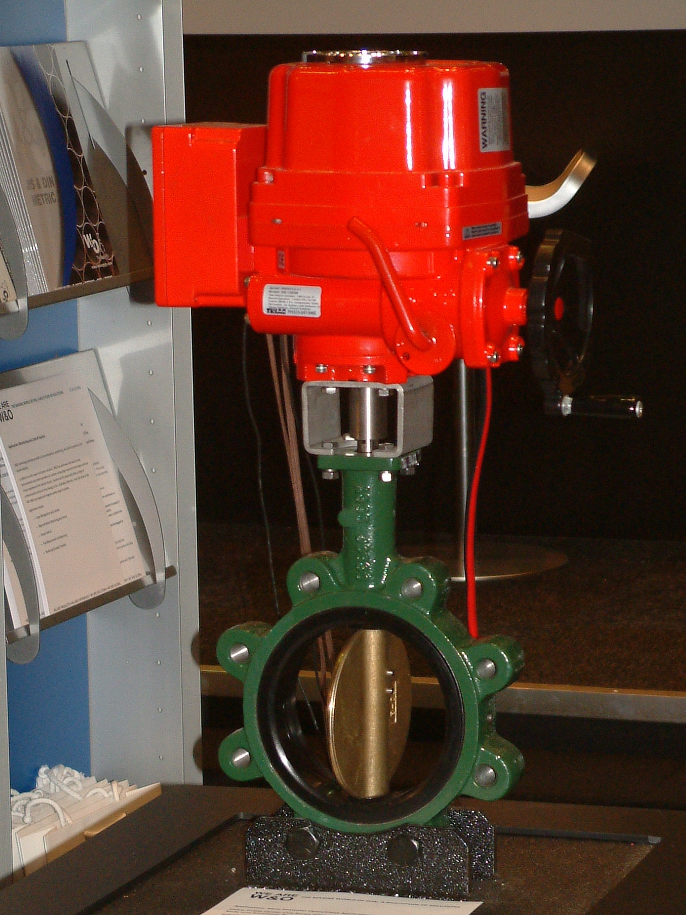 Europort 2009